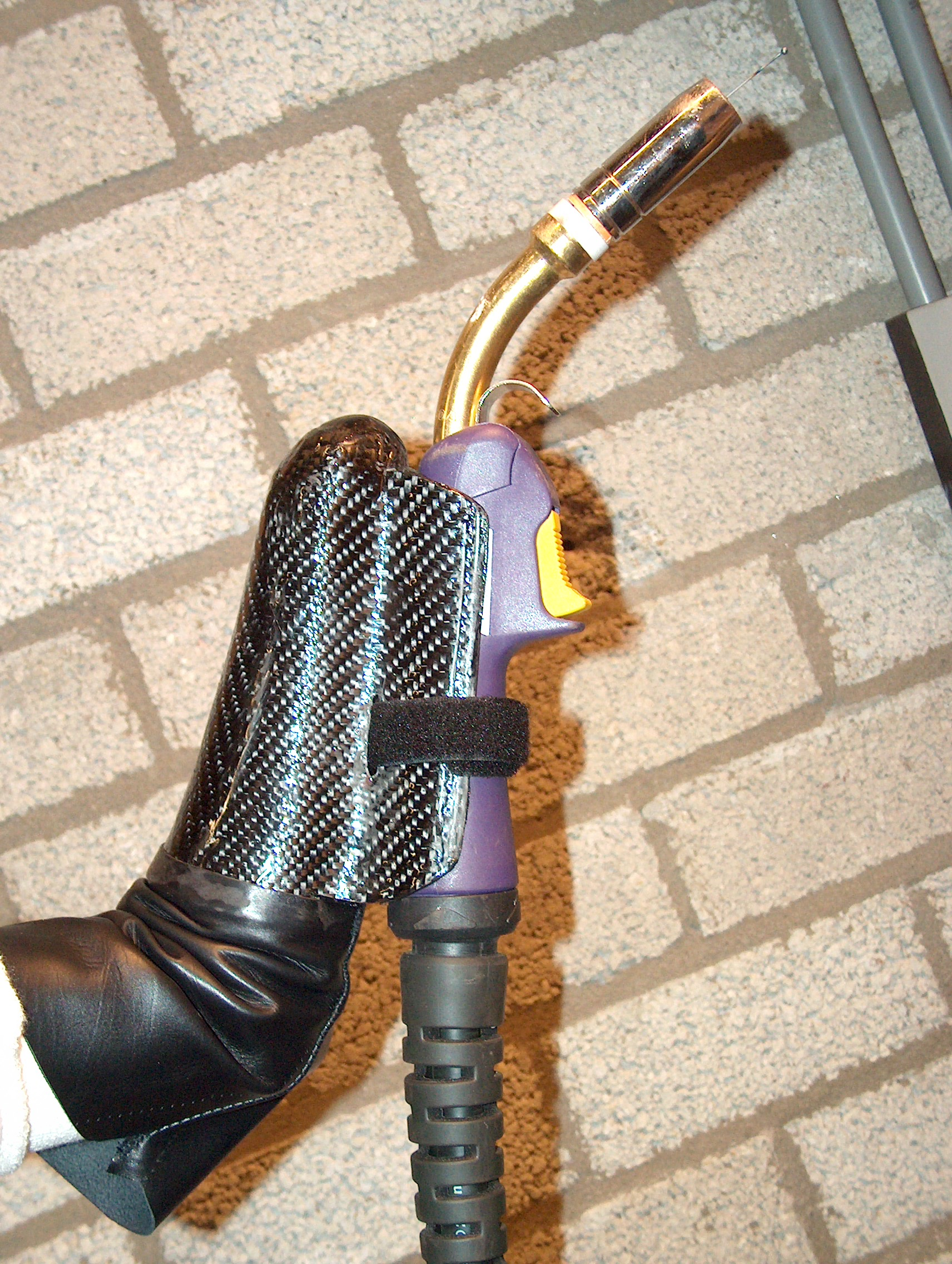 aanpassing voor het lassen zonder handen